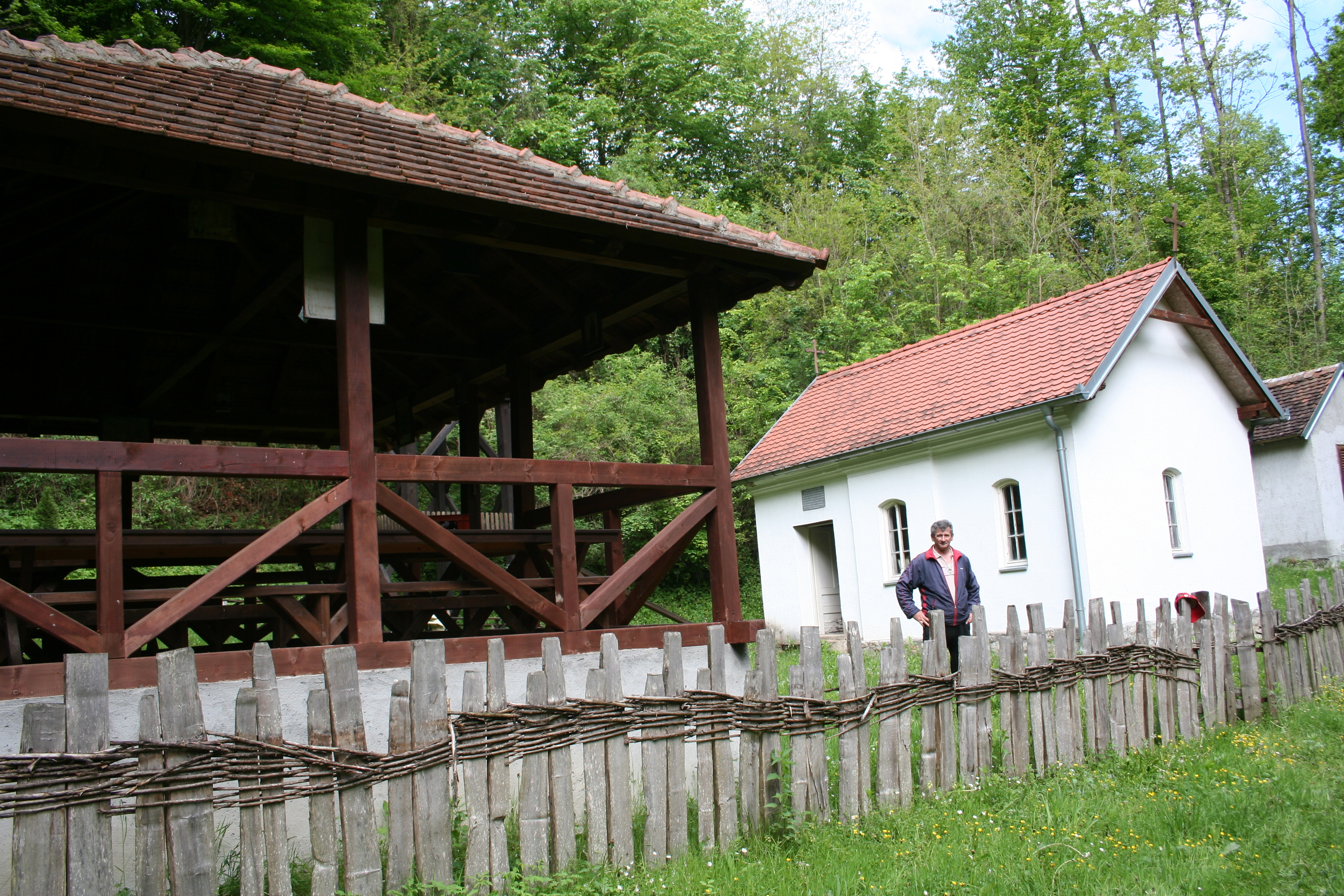 Crkva Sv. proroka Ilije, Ravnaja